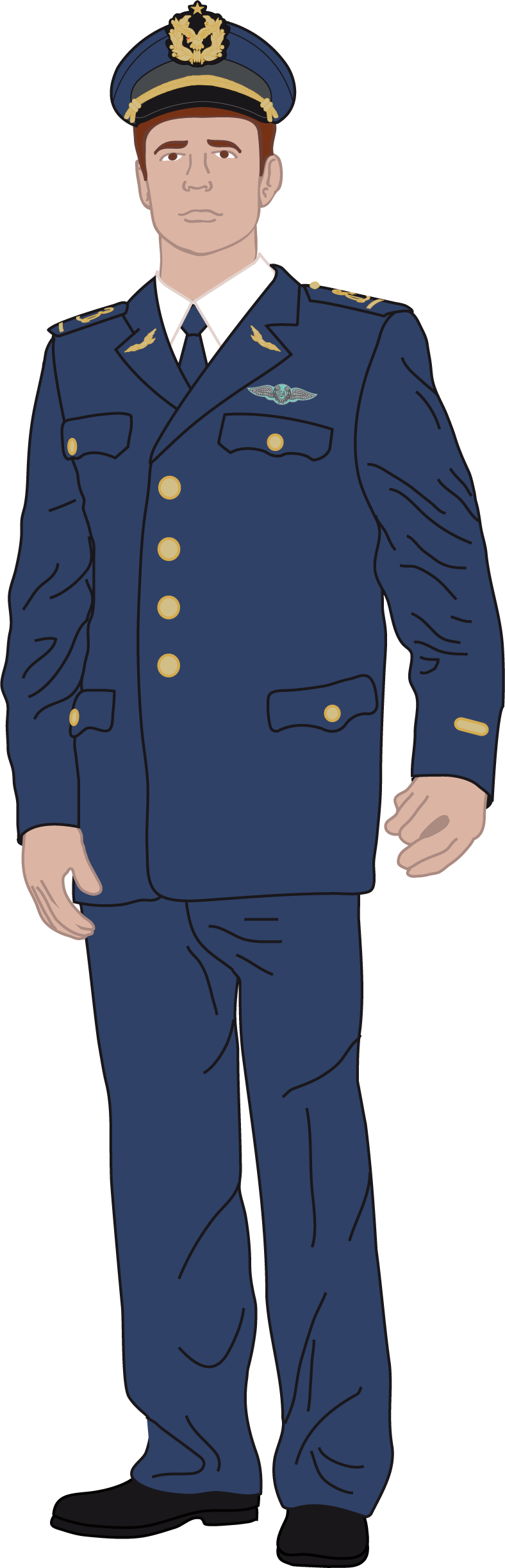 Uniforme de Cadete de la Fuerza Aérea de Chile